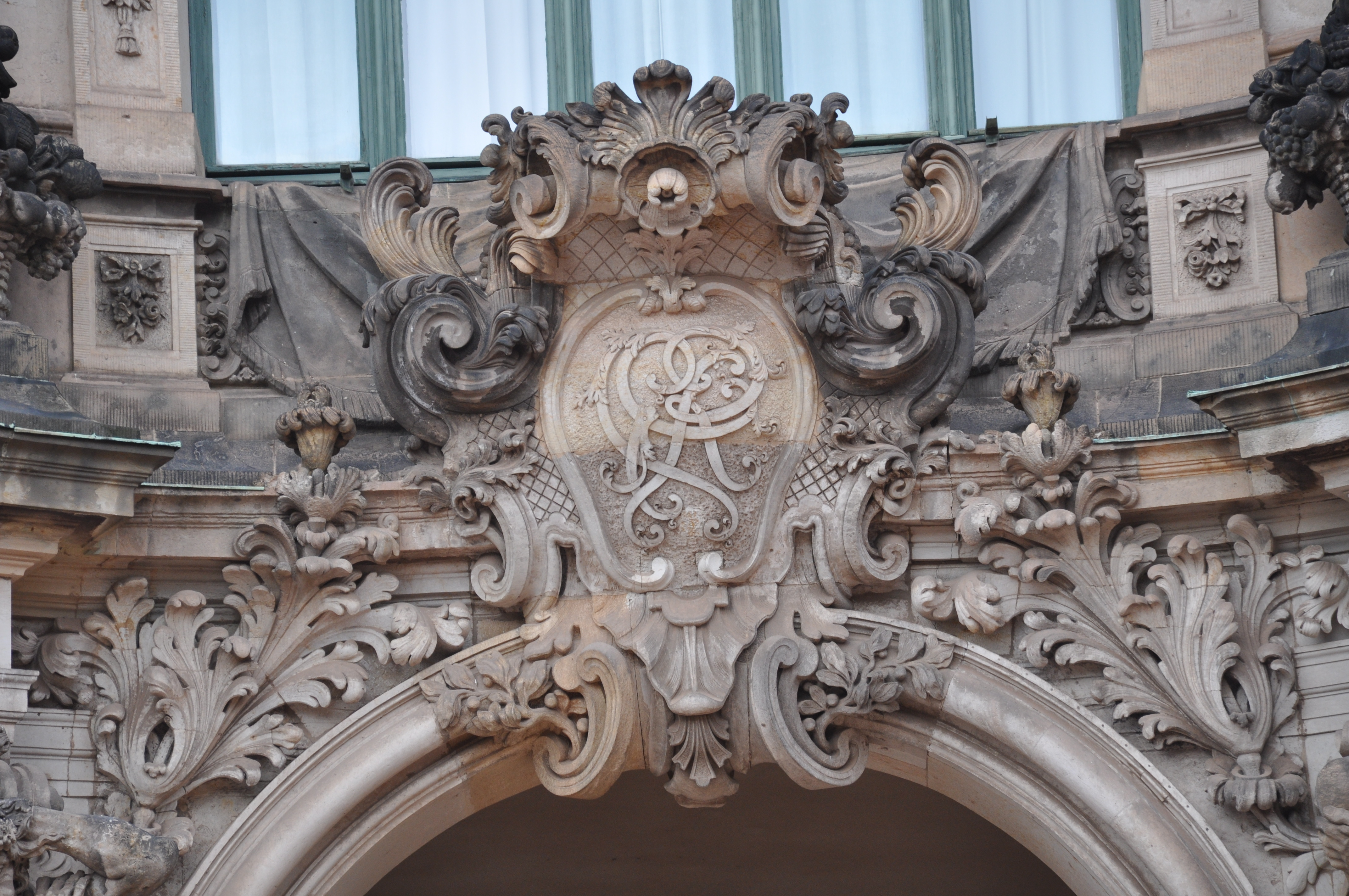 Dresden, Zwinger, Monogramm; Schlussstein am Wallpavillon mit den Buchstaben A.R. (Augustus Rex)